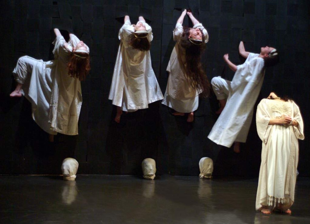 "הבקכות" מאת אוריפידס, בימוי ועיבוד דוויד זינדר, עיצוב במה ותלבושות מרים גורצקי, התיאטרון המוניציפלי ההונגרי בקלוז שברומניה, 2004